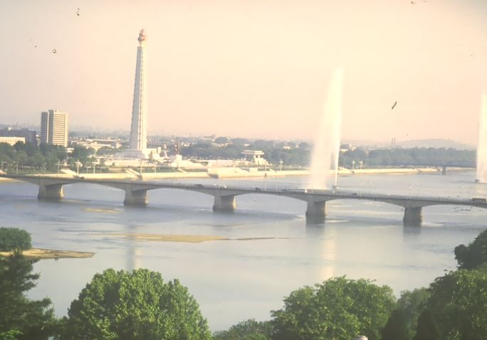 Pyeongyang Taedongfluss, Chuche-Turm.